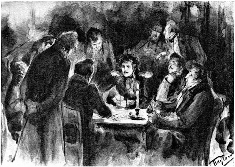 Illustrazione per il dramma in versi Un ballo in maschera di Lermontov